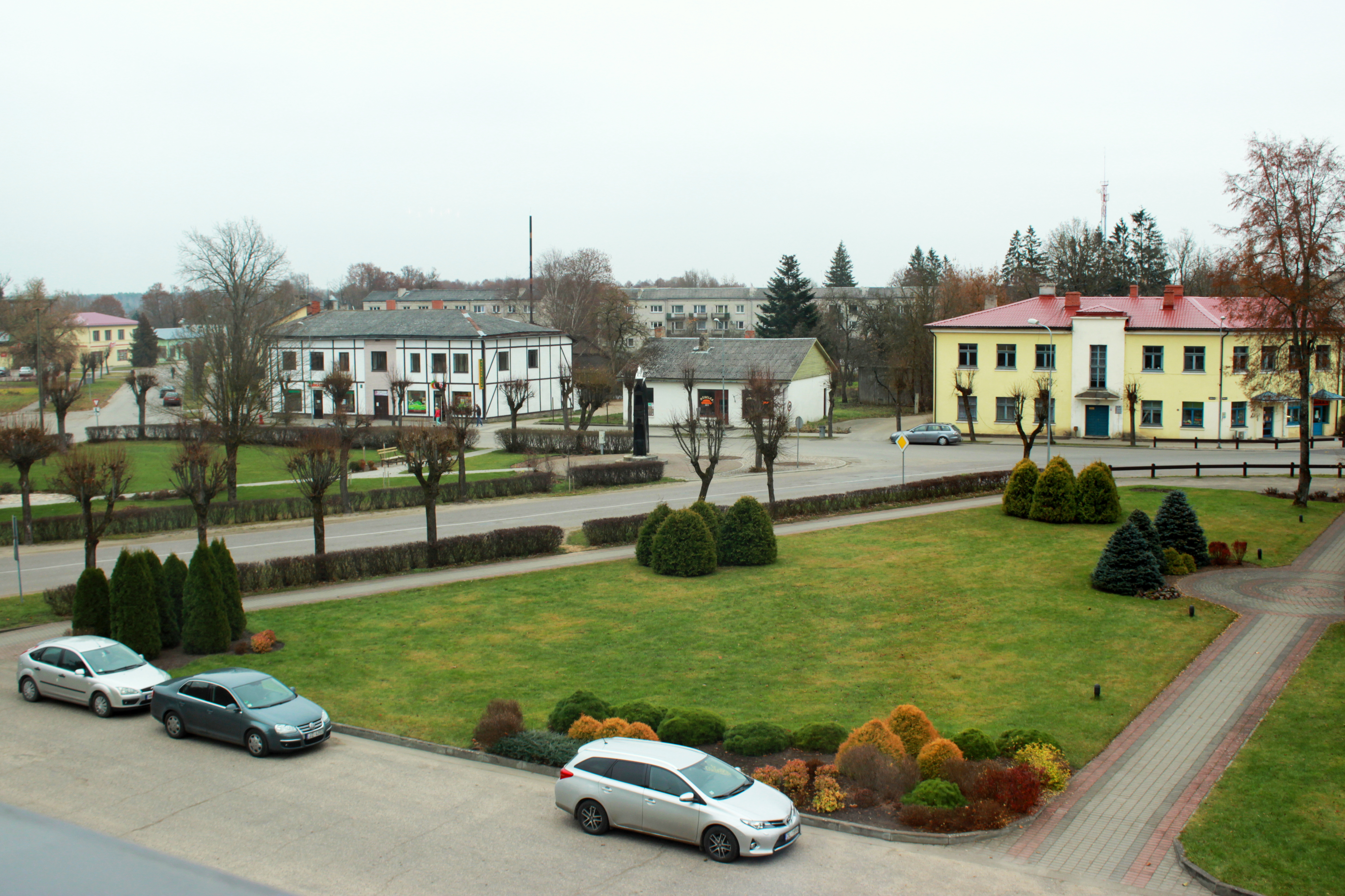 Skrunda